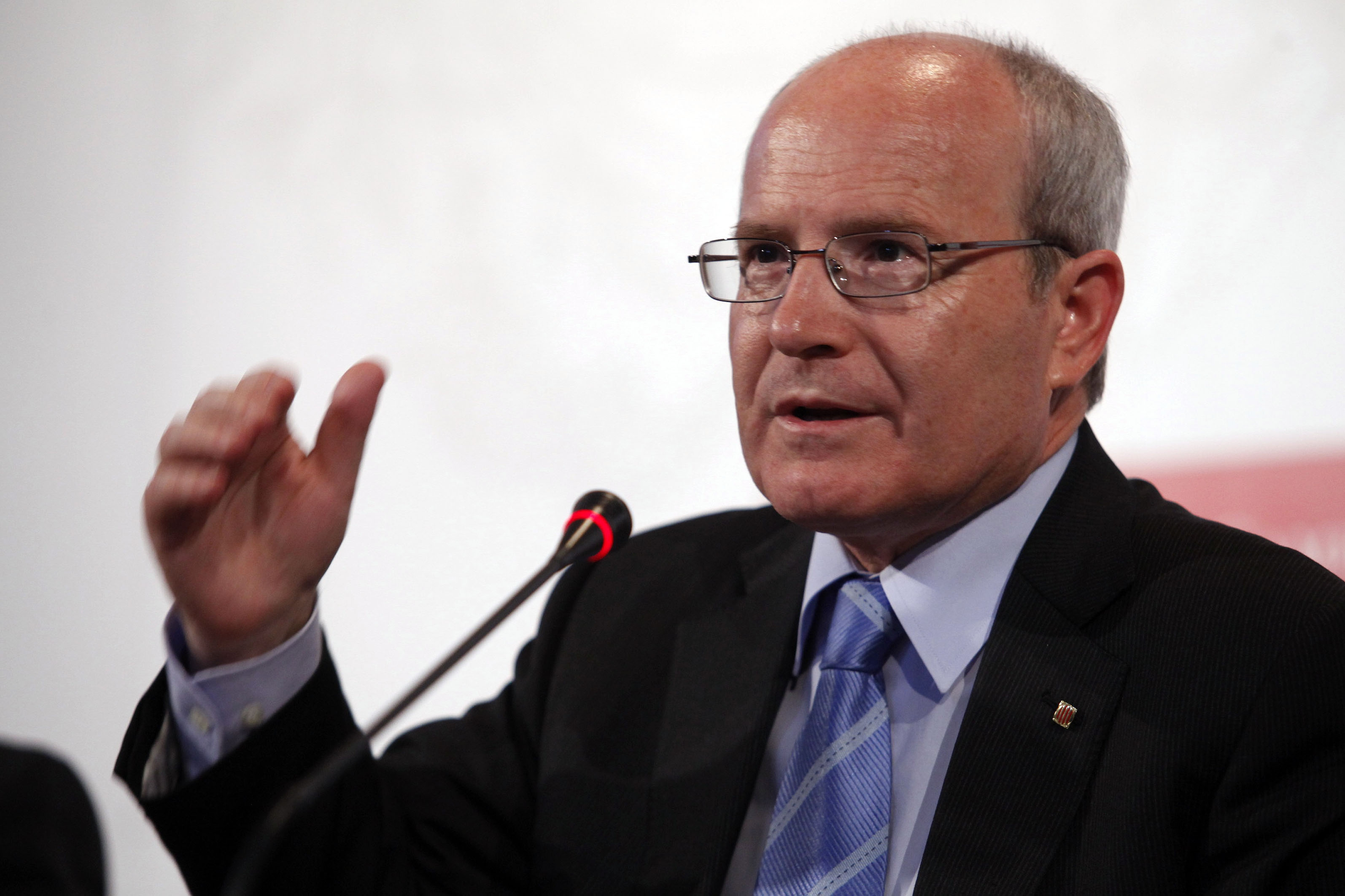 Dinar Cambra amb el president i candidat a la reelecció a la Presidència de la Generalitat, José Montilla